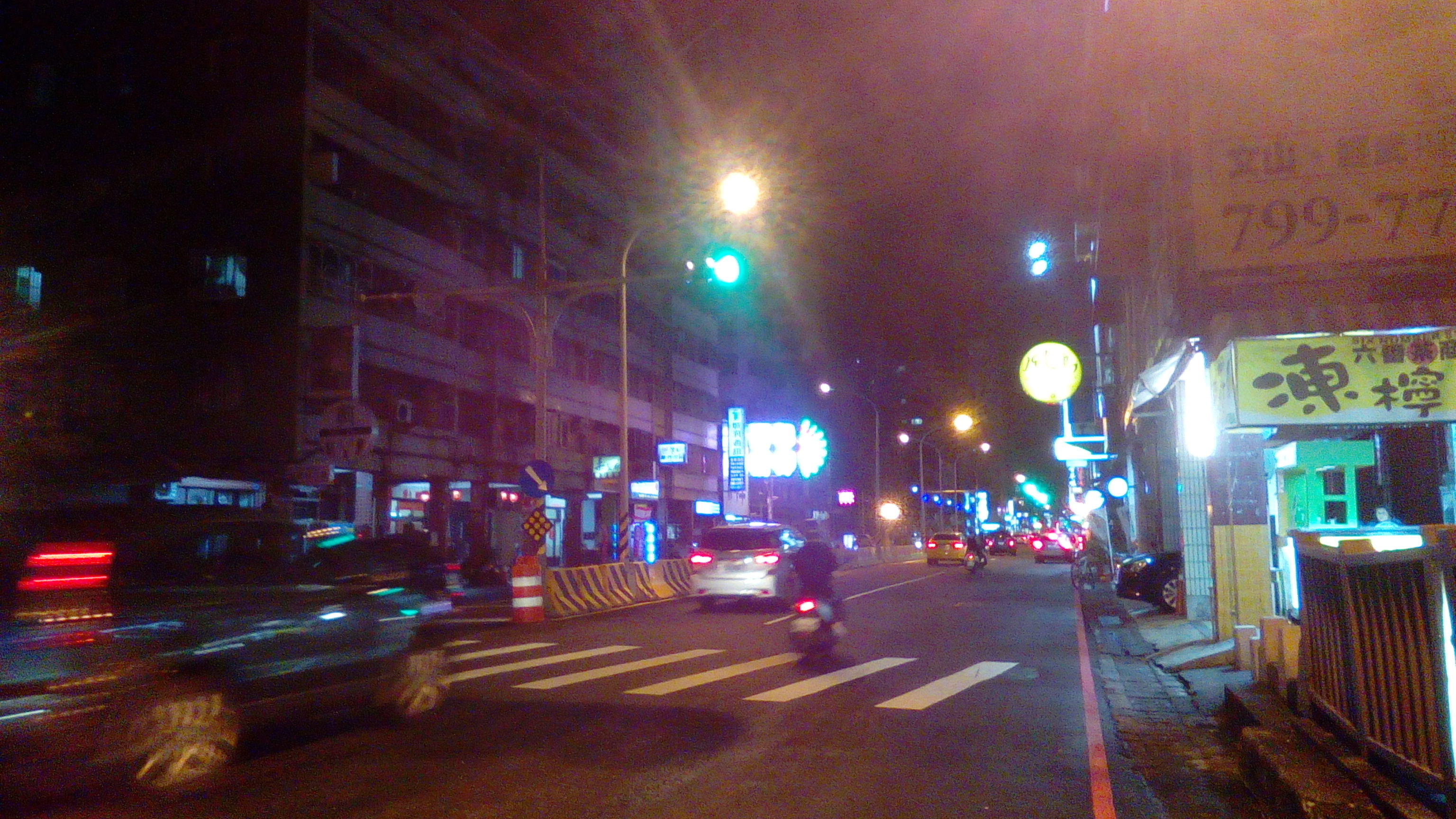 鳳山區青年路二段